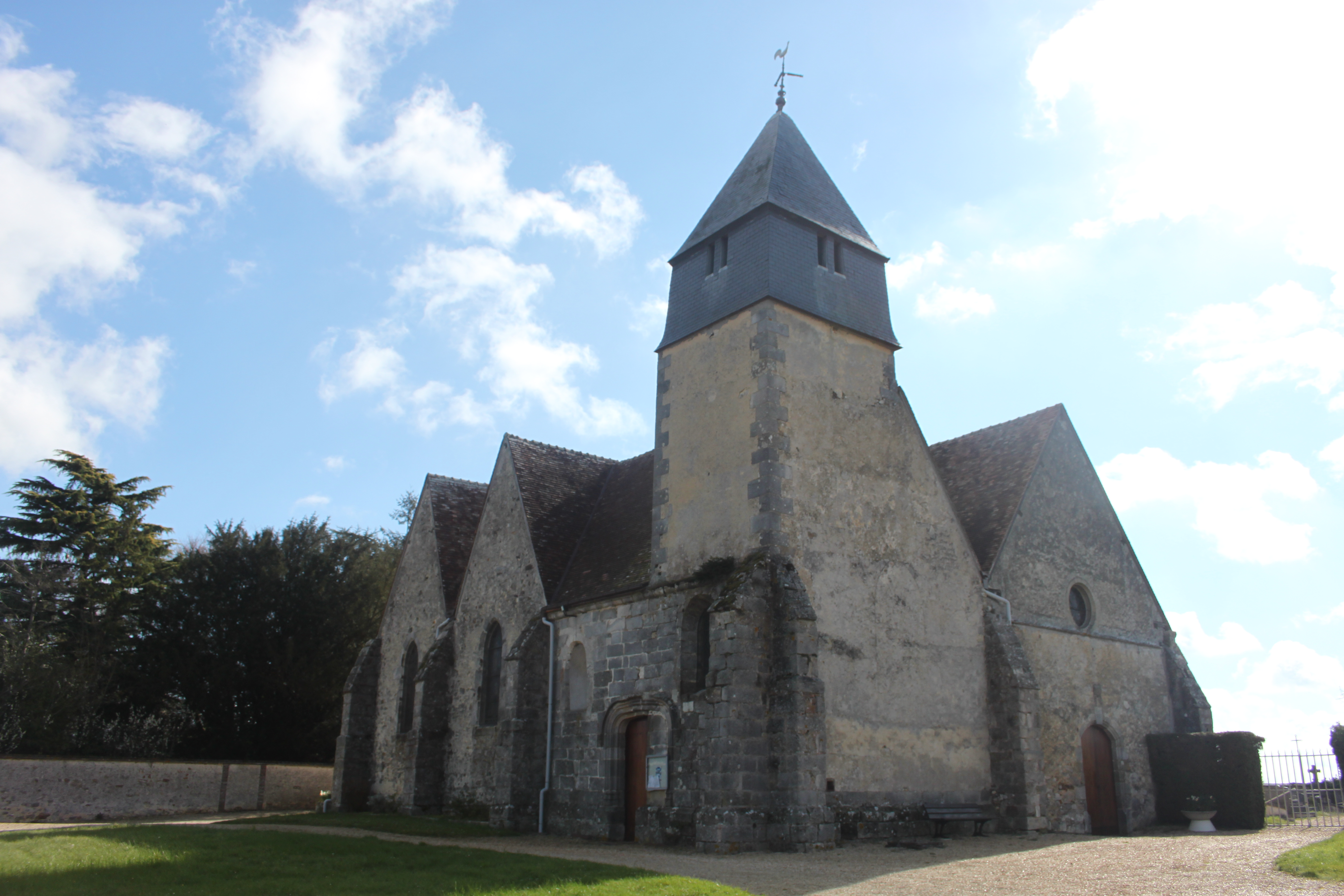 Eglise de Saint-Martin-de-Nigelles en Eure-et-Loir